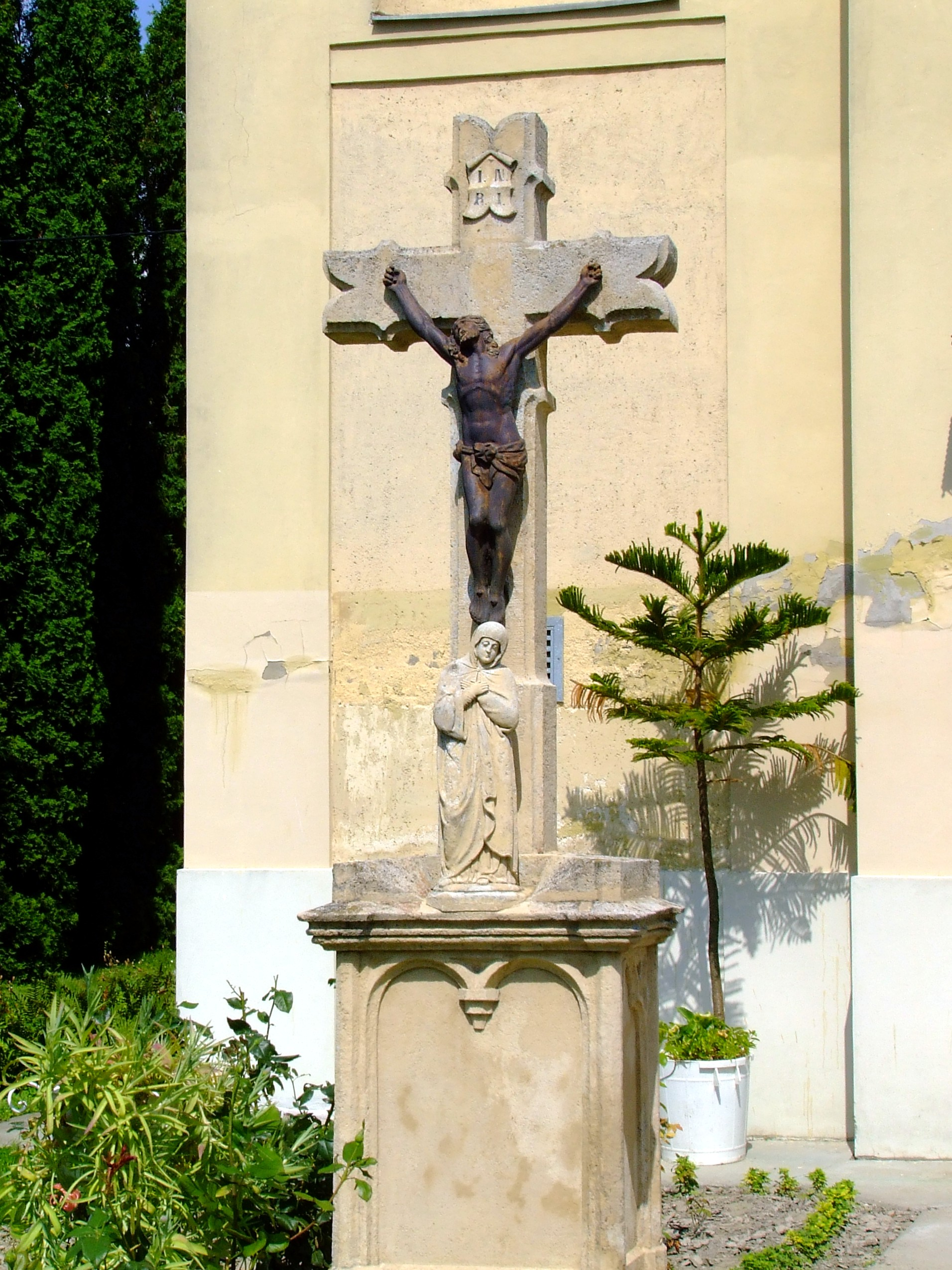 Feszület a dunapataji Magyarok Nagyasszonya-templom előtt